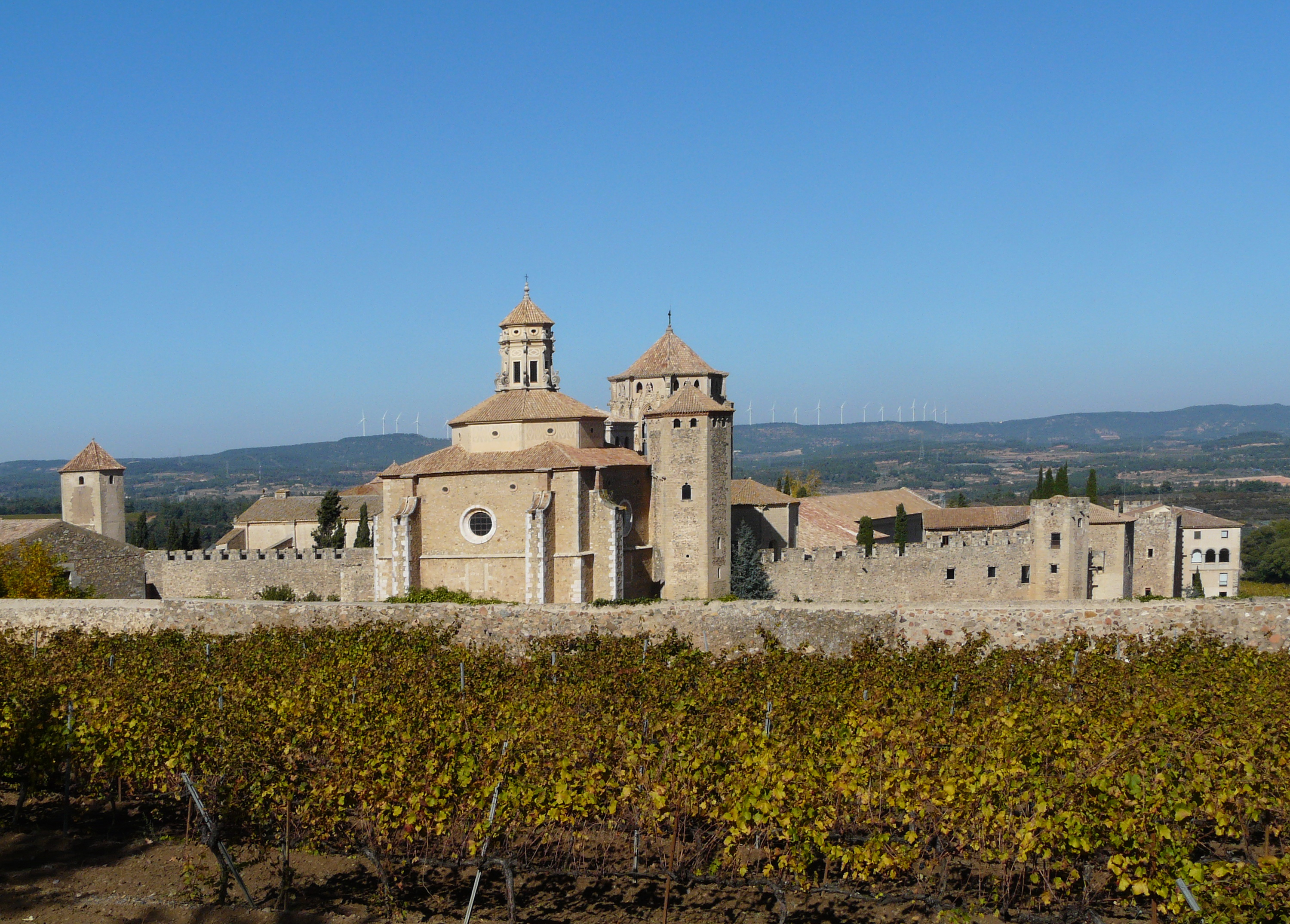 Reial Monestir de Poblet, Spain